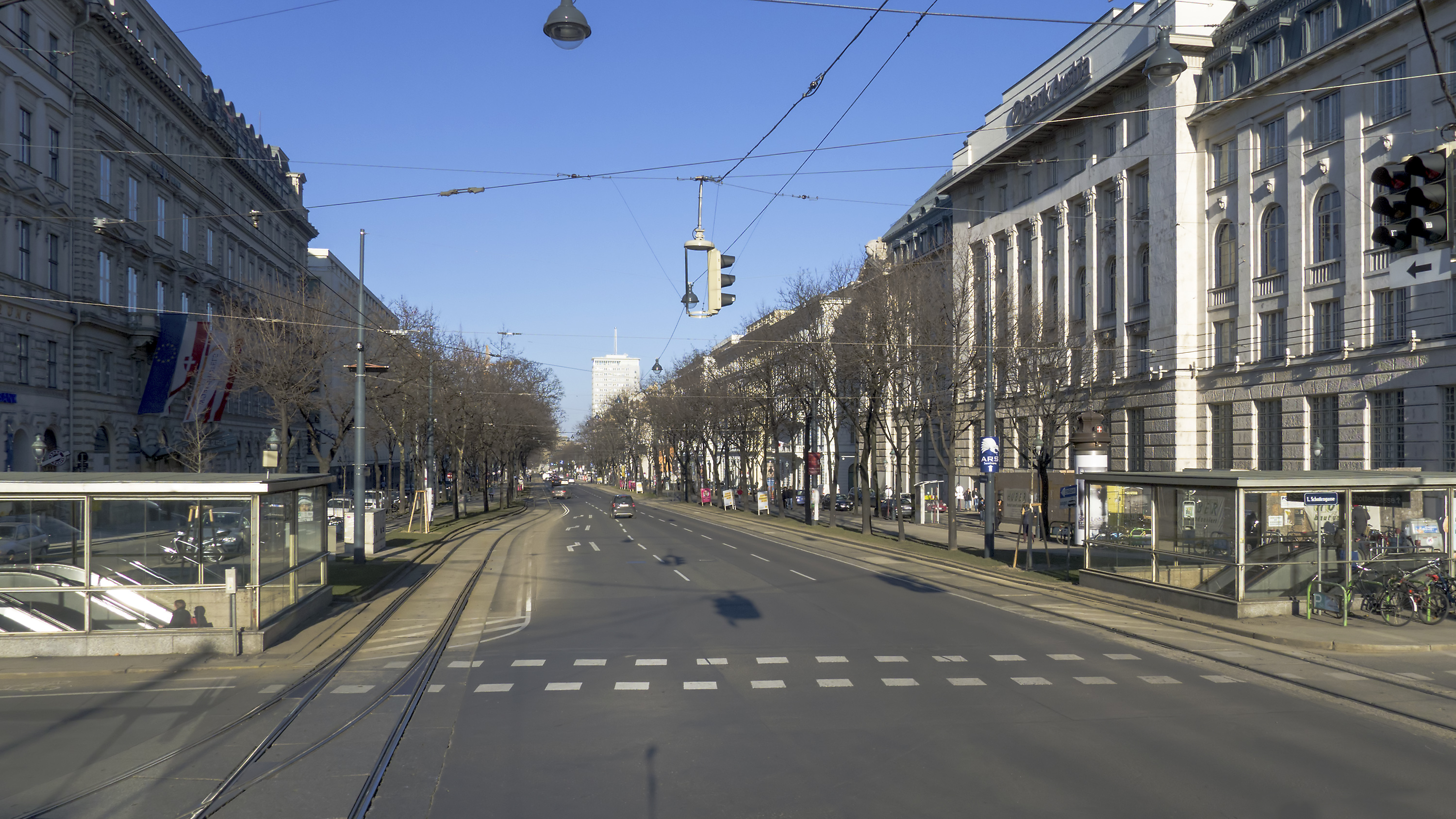 Schottenring in Wien 1 bei der Schottengasse Richtung Nordosten